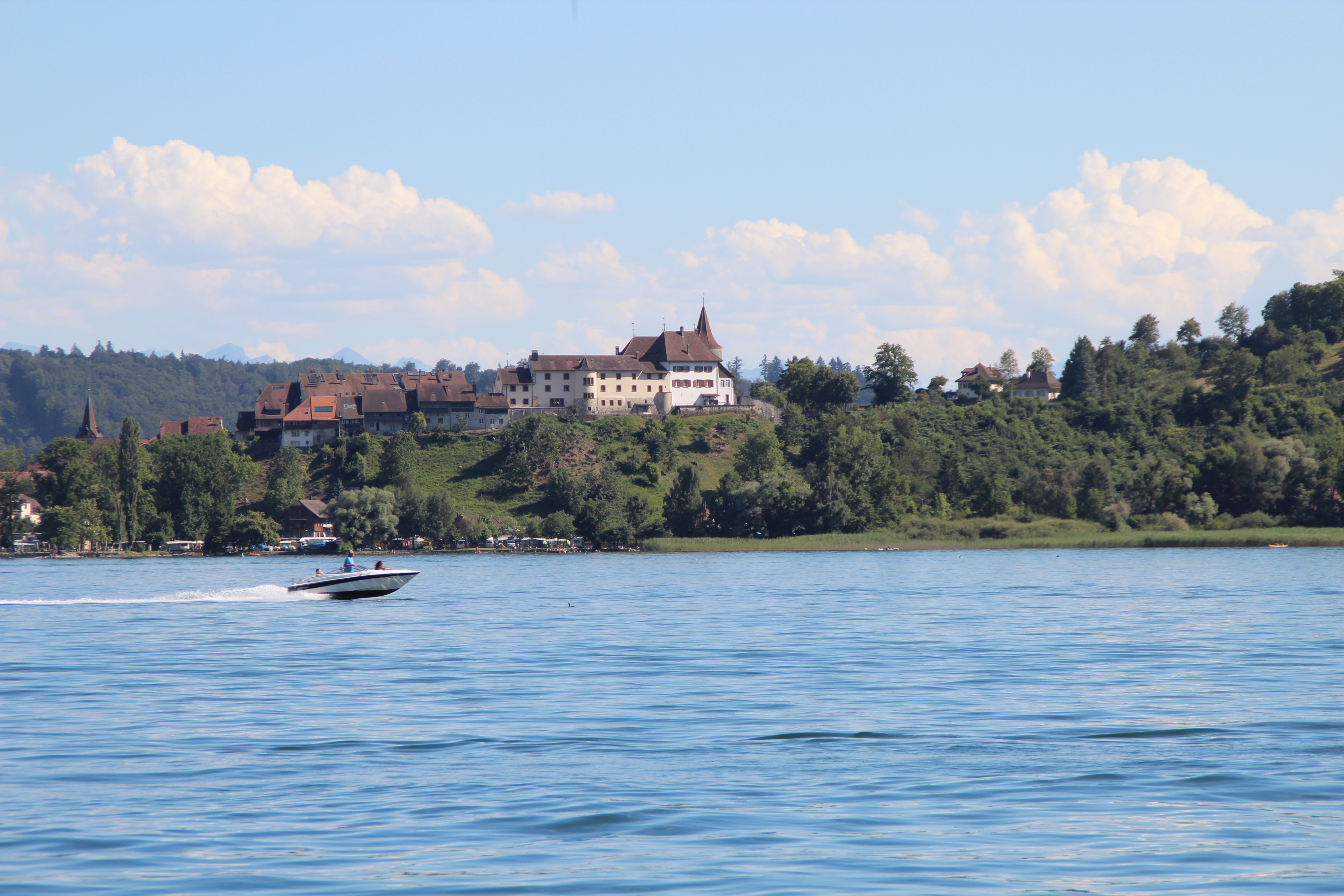 Erlach BE